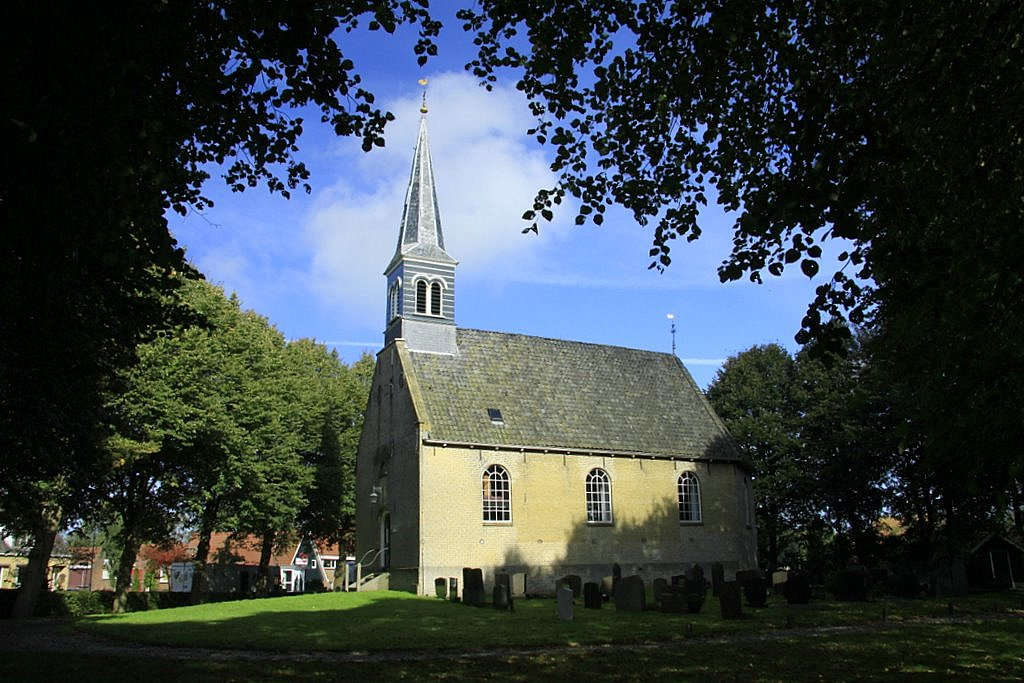 Het kerkje van het Friese dorp Aldegea in de Gemeente Gaasterlân-Sleat staat lekker in het zonntje te pronken.